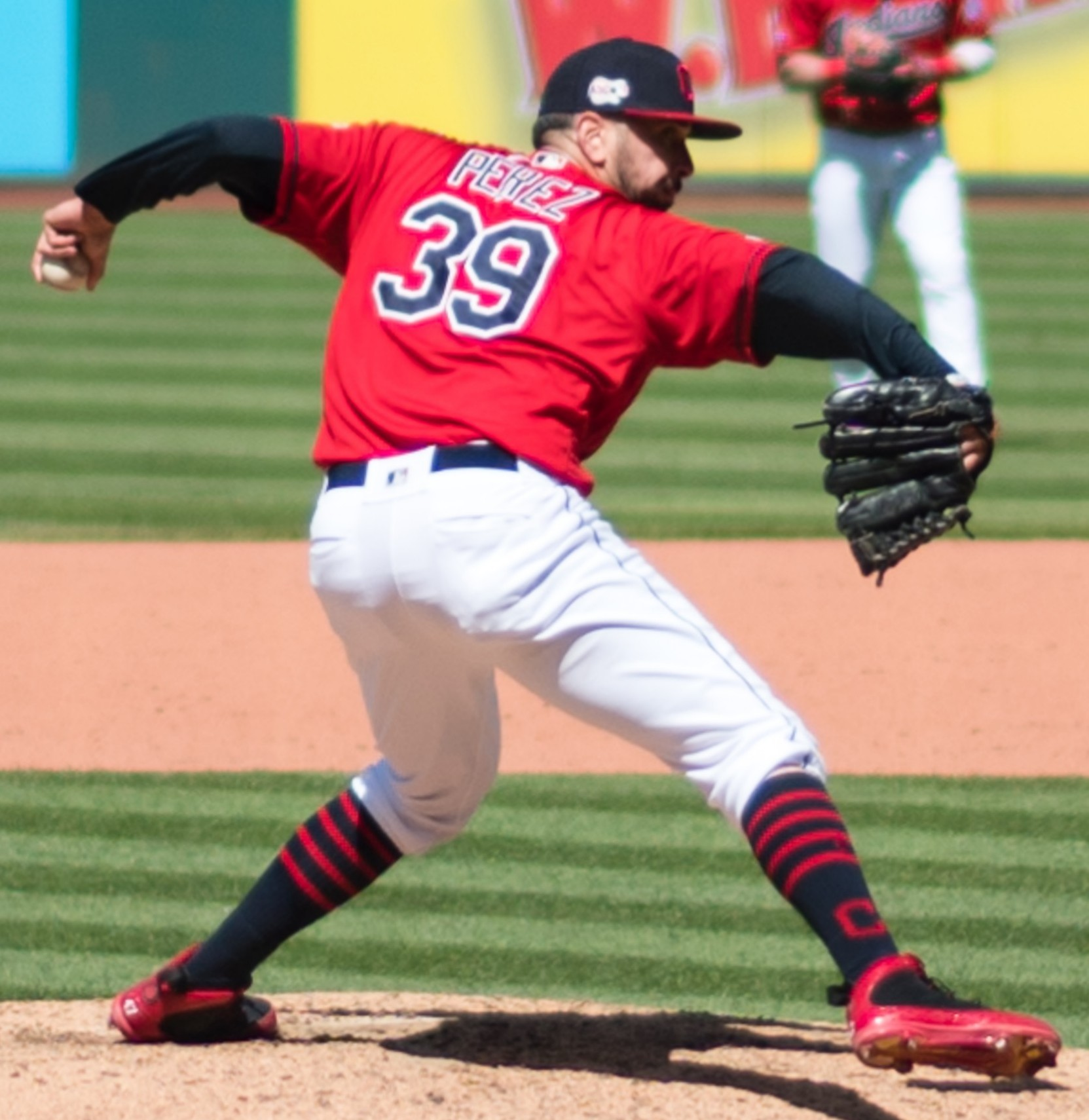 Seattle Mariners VS. Cleveland Indians